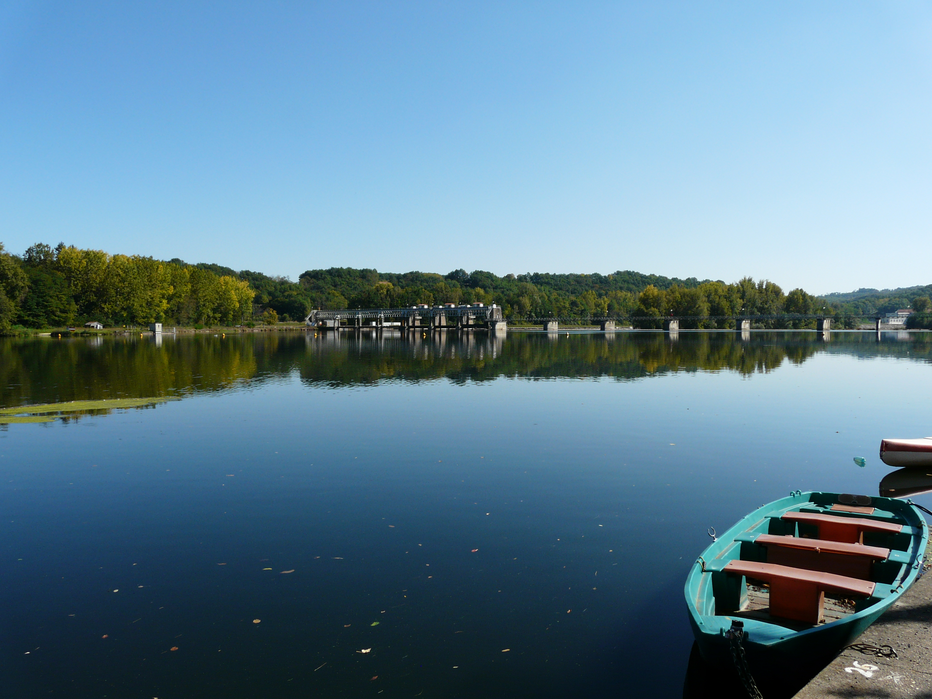 La retenue et le barrage de Mauzac sur la Dordogne entre Calès à gauche et Mauzac-et-Grand-Castang à droite, Dordogne, France.